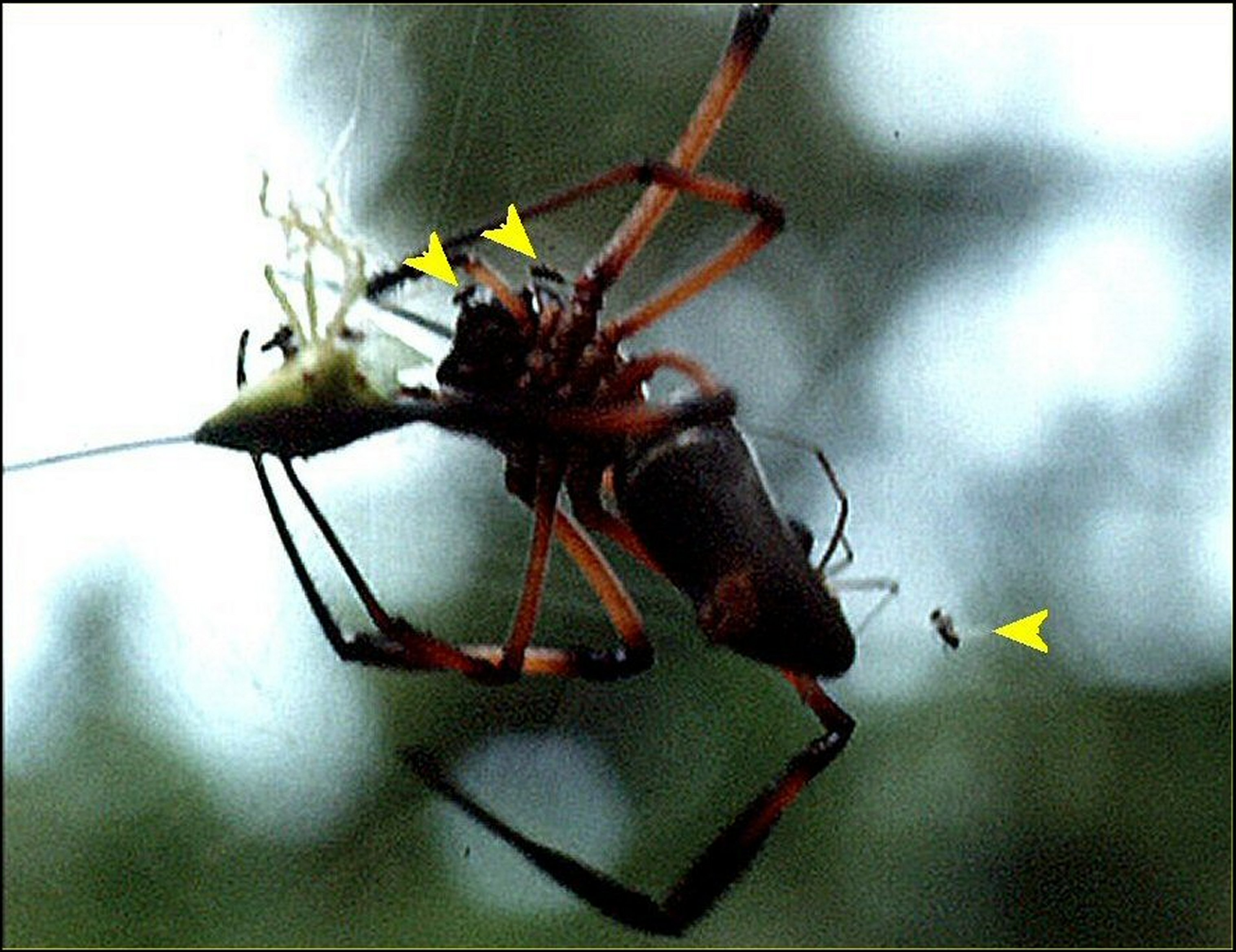 Araignée Nephila inaurata se nourrissant d'une Punaise Pentatomide qui attire des Milichiidae (Seychelles)